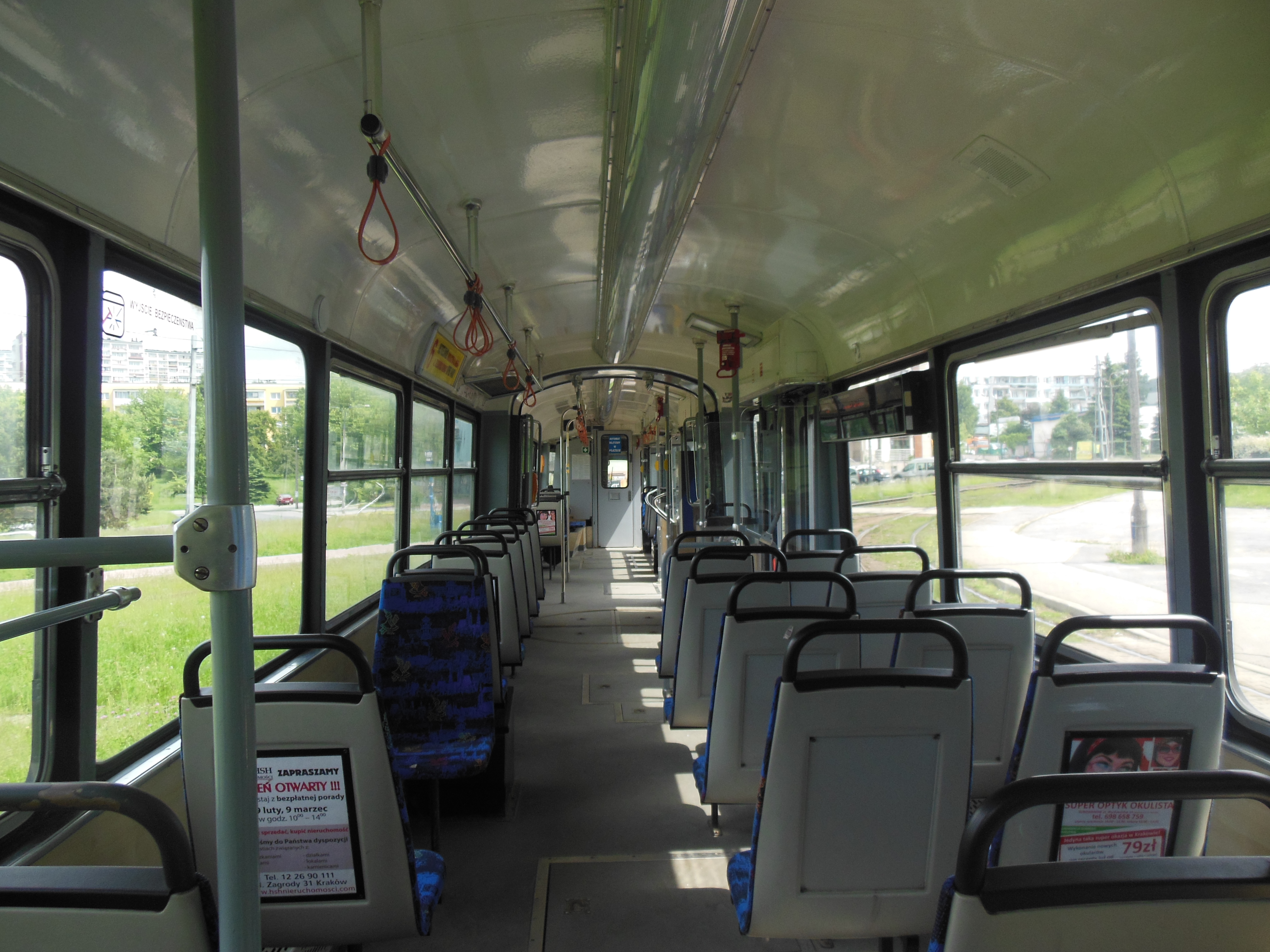 Wnętrze tramwaju SGP/Lohner E1, Kraków.